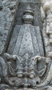 ಕನ್ನಡ: ನಾಗರ ಶೈಲಿಯ ಶಿಖರ